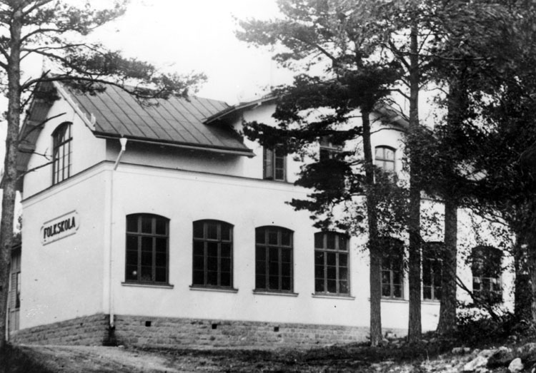 Lövsta skola byggdes 1903 i Järfälla kommun. Senare blev den Spånga ungdomsgård. Vy från Mälaren. Sedan 1975 tillhör byggnaden Hässelby i Stockholms kommun. Bild nr 00633.